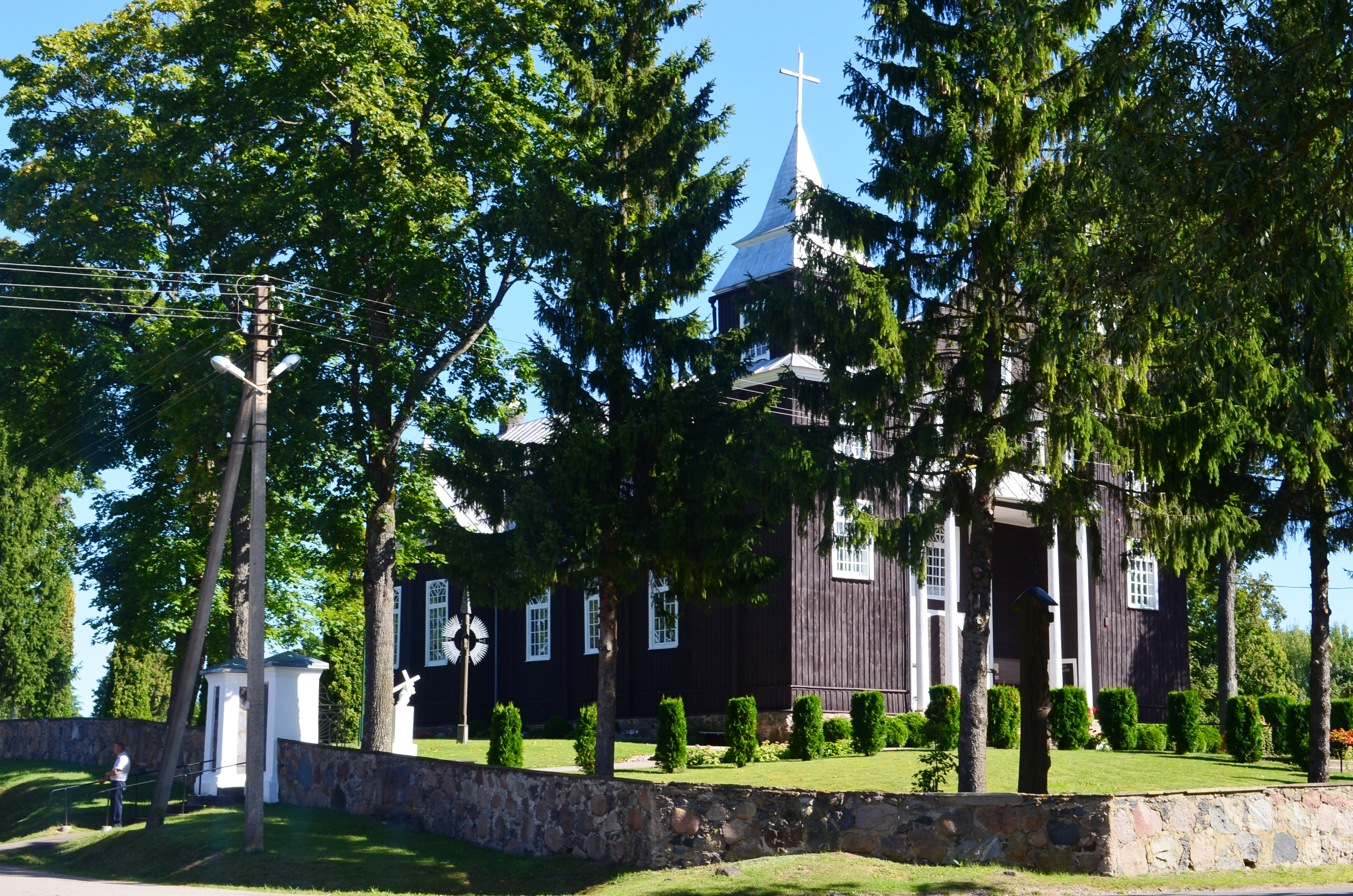 Antazavės Dievo Apvaizdos bažnyčia